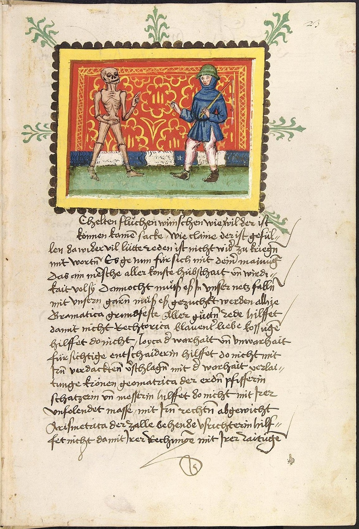 Codex Palatinus germanicus 76, Blatt 23r - Johannes von Tepl: Der Ackermann aus Böhmen - Der Tod betont seine Allmacht